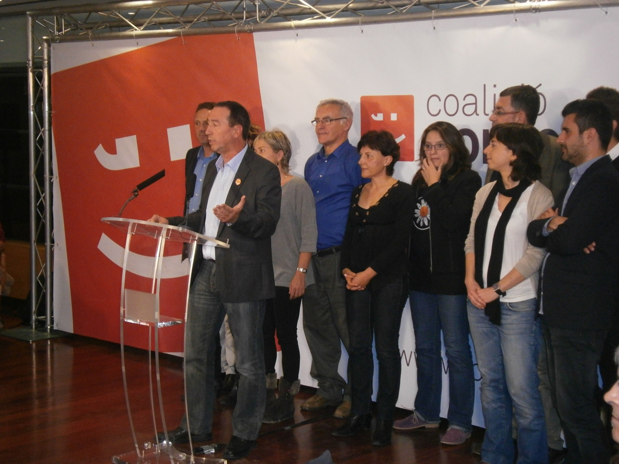 Enric Bataller, Joan Baldoví, Joan Ribó, Cristina Domingo, Mònica Oltra, Enric Morera, Helena Malonda i Pere Fuset, a l'acte de Compromís en saber-se els resultats de les eleccions generals del 2011